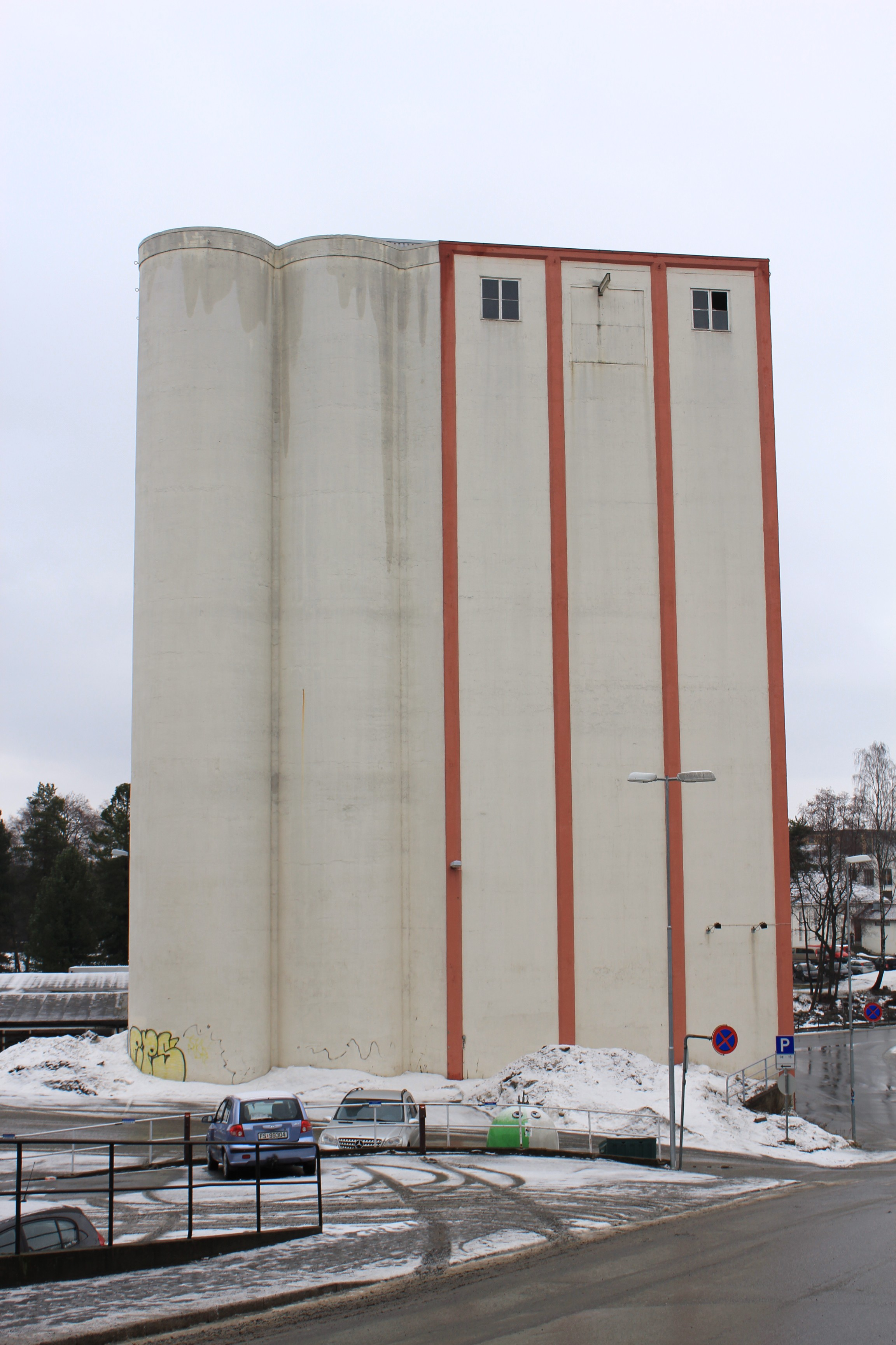 Kornsiloen på Gjøvik.